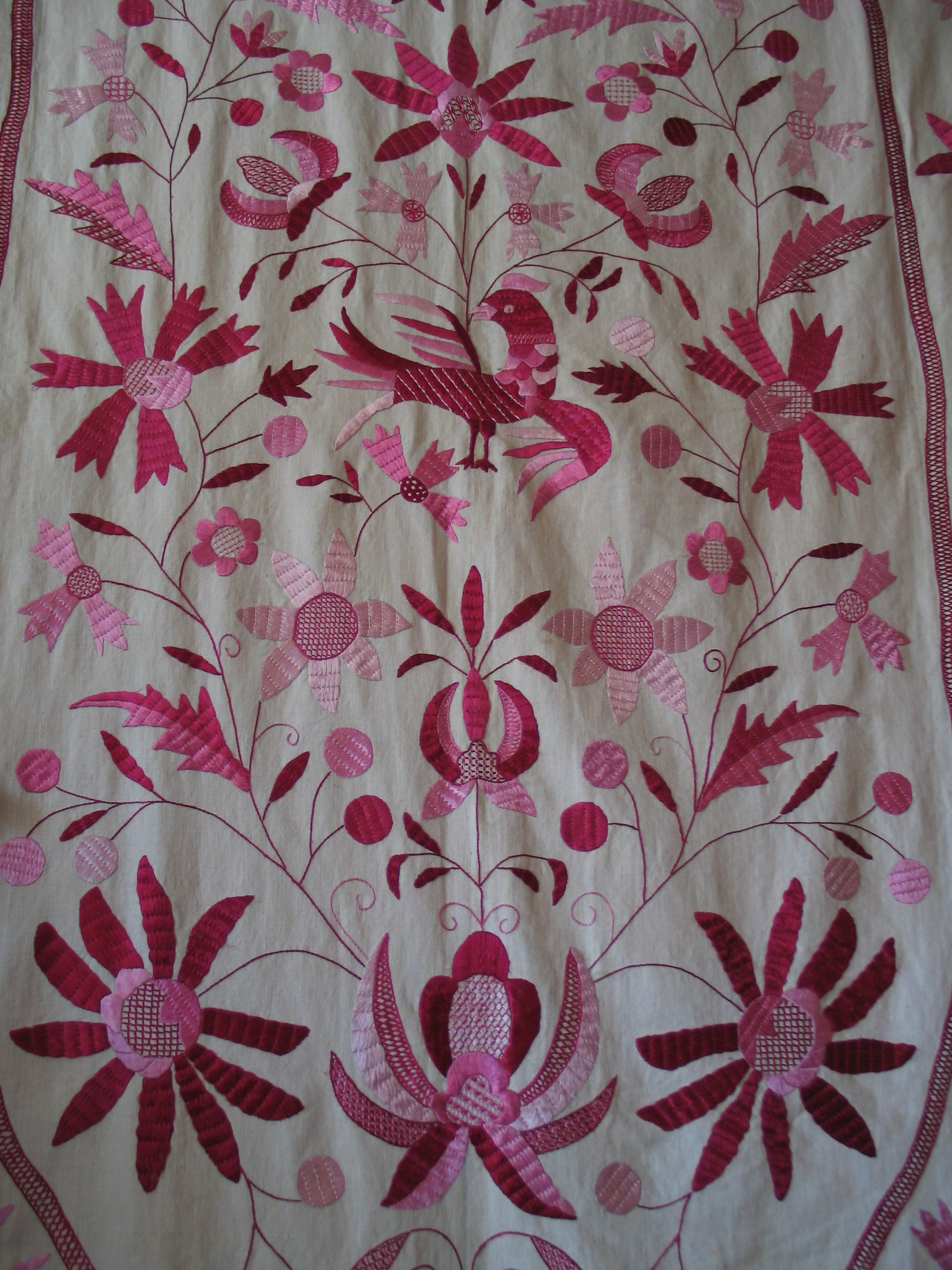 Bordado de Castelo Branco, Portugal.